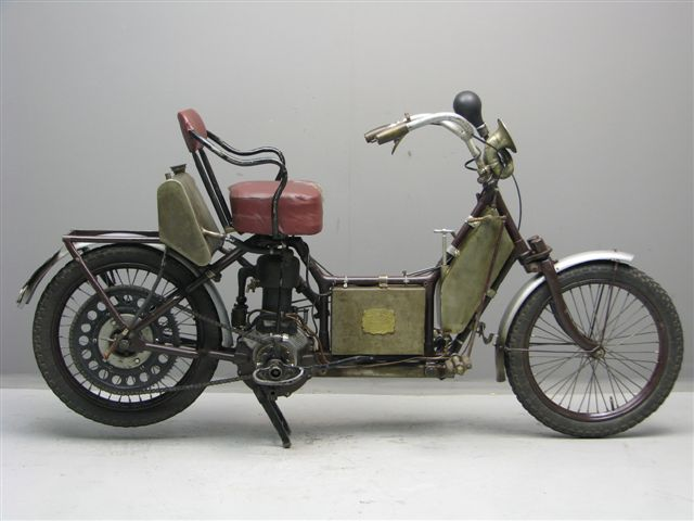 Autofauteuil 490 cc motorcycle from 1908